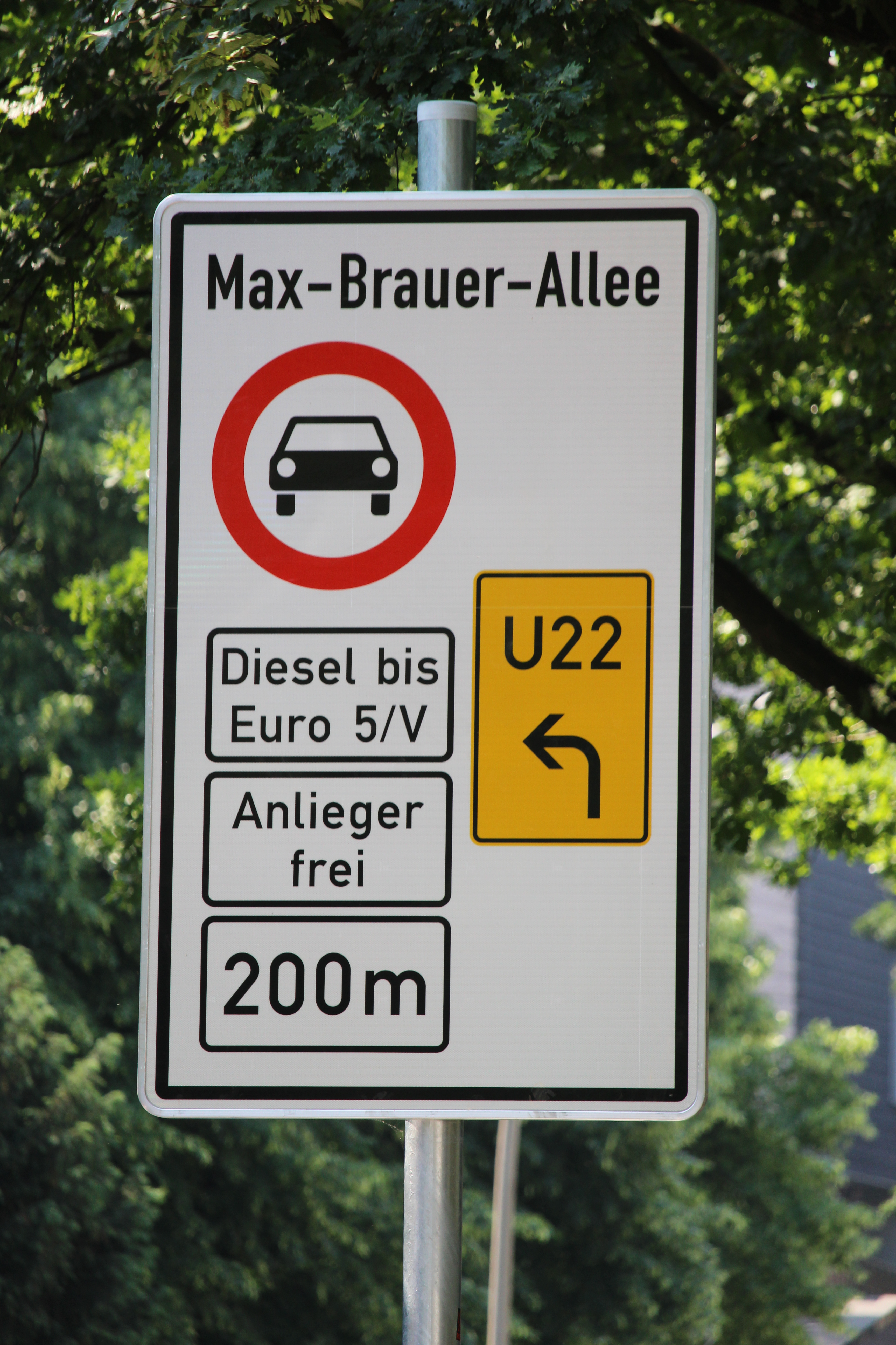 Straßenschilder für das Dieselfahrverbot in Hamburg-Altona-Altstadt. Schild in der Max-Brauer-Allee.